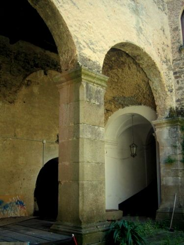 Palazzo del Mercato, in alto l'ex Ponte levatoio, ingresso delle Carceri e scalone aperto da Enrico